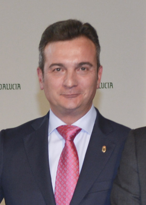 15.04.15 Toma posesión Rector de Cádiz 2